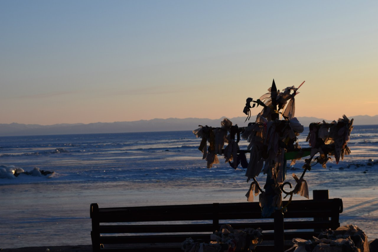 Листвянка, Иркутский район This image is related to the protected area of Russia number 3810100